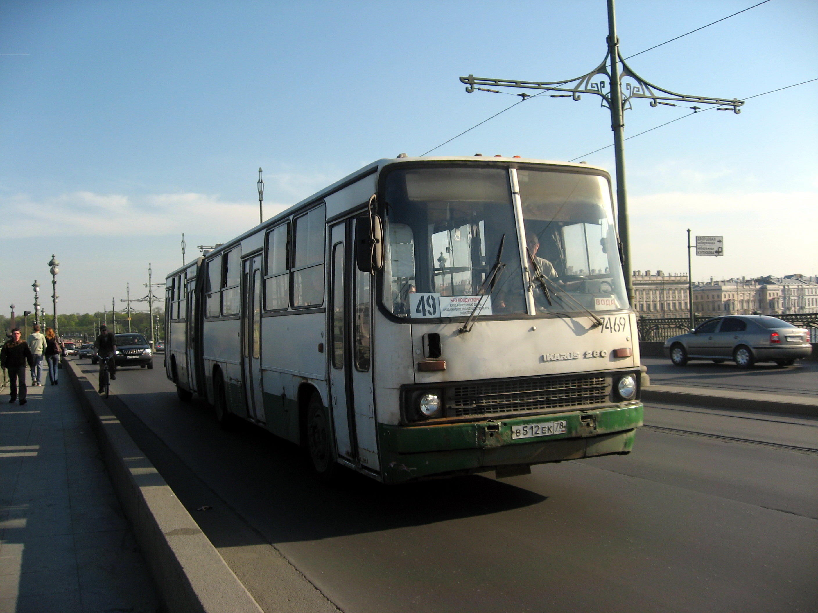 Ikarus-280.33O v Sankt-Petěrburgu